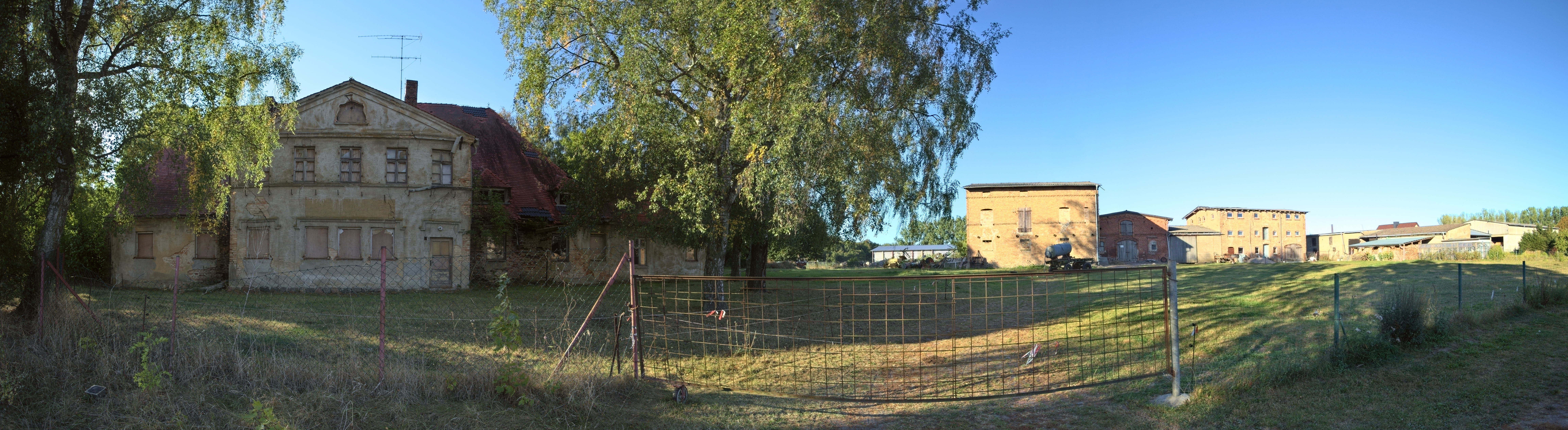 Gutshaus und Nebengebäude des Gutshofs in Klein Kiesow